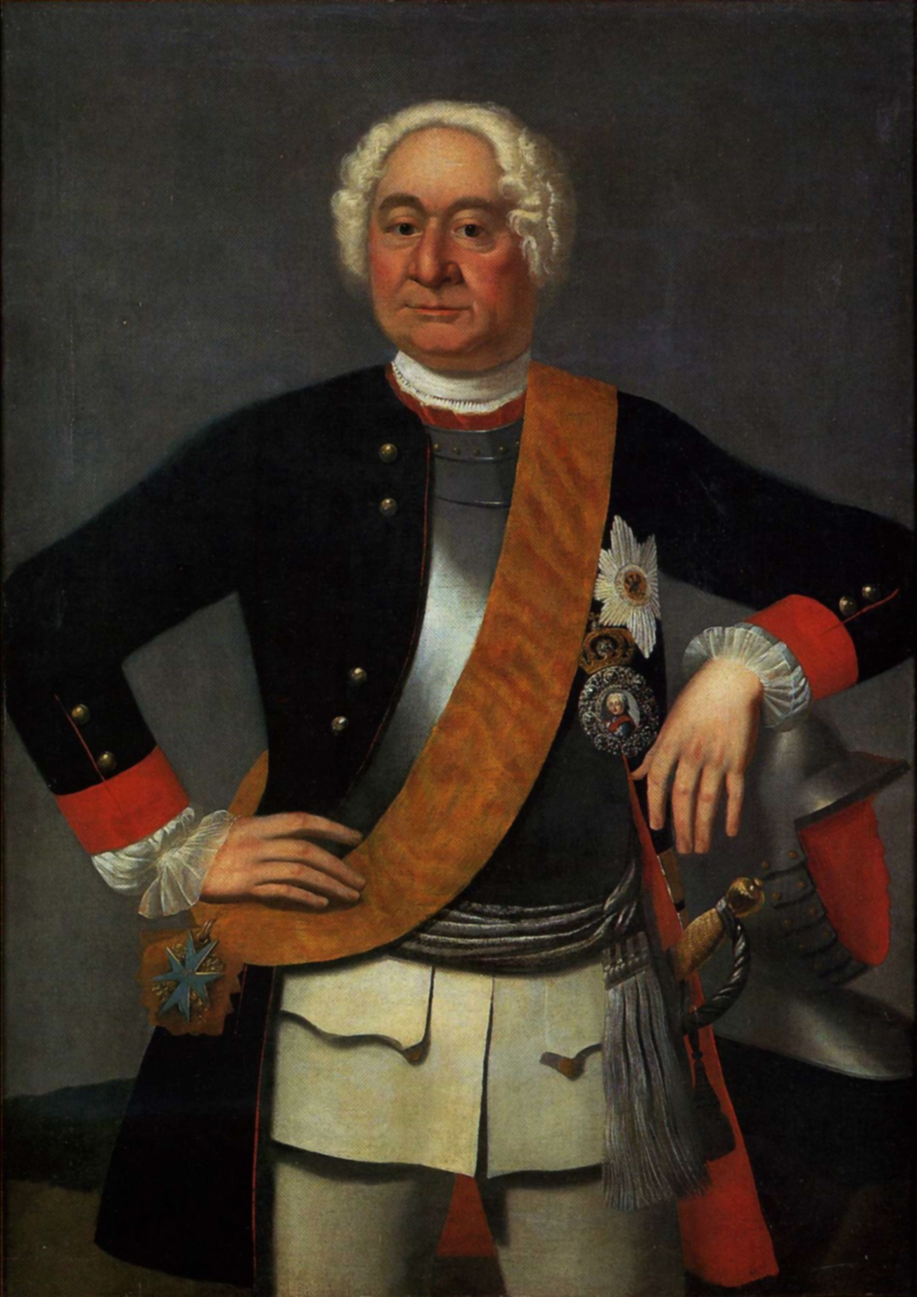 Friedrich Wilhelm von Dossow, preußischer Generalfeldmarschall mit Brillant-Porträt Friedrichs des Großen.